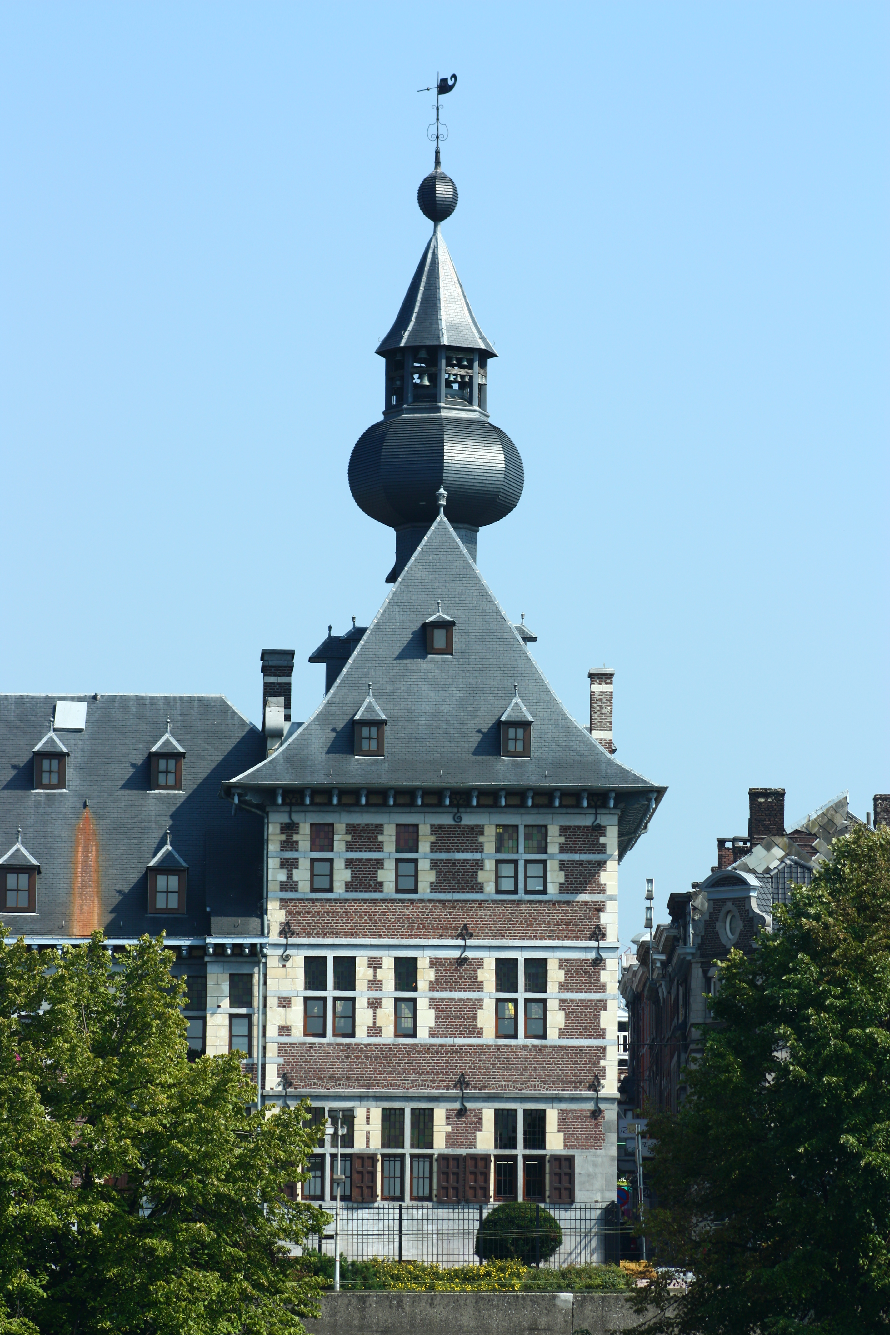 L'hôtel de ville de Visé, dans la province de Liège, en Belgique. Monument classé n°62108-CLT-0001-01.